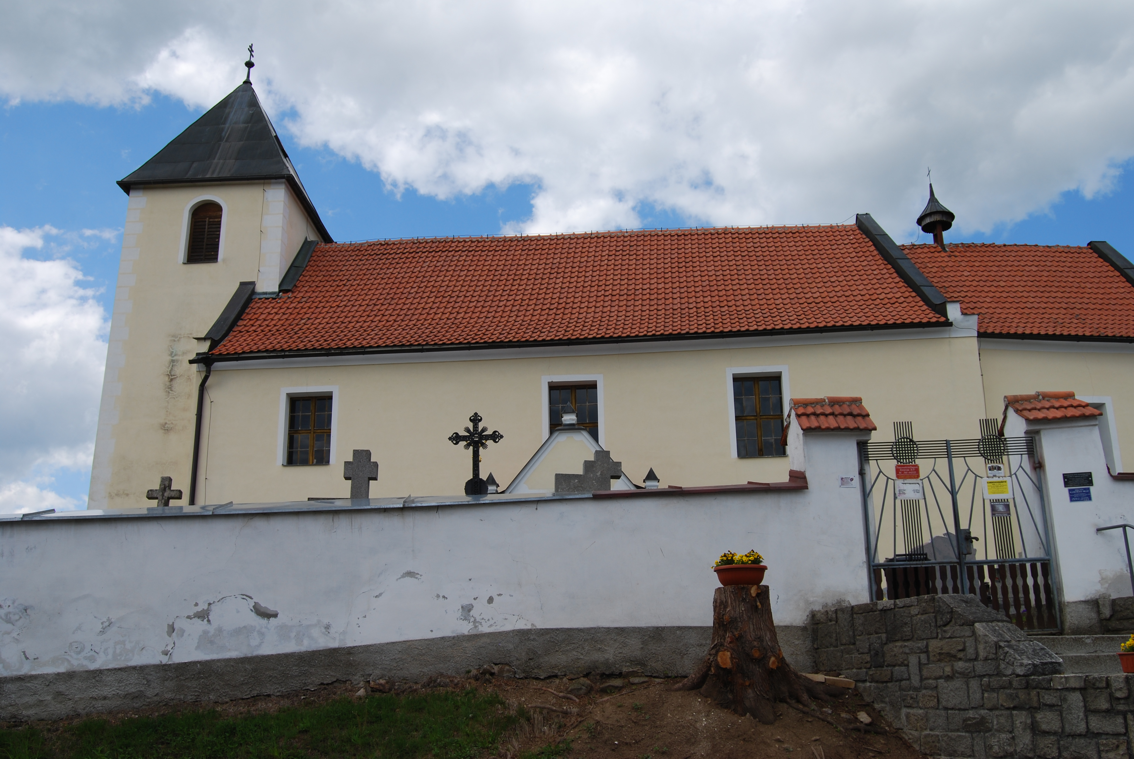 Kostel svaté Maří Magdalény. Obec Svatá Maří se nachází v okrese Prachatice, kraj Jihočeský, Česká republika.